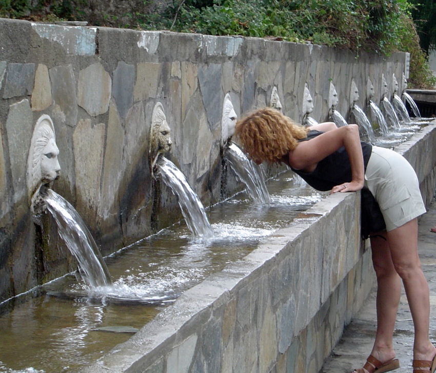 Photo prise par moi-même à Spili en août 2005